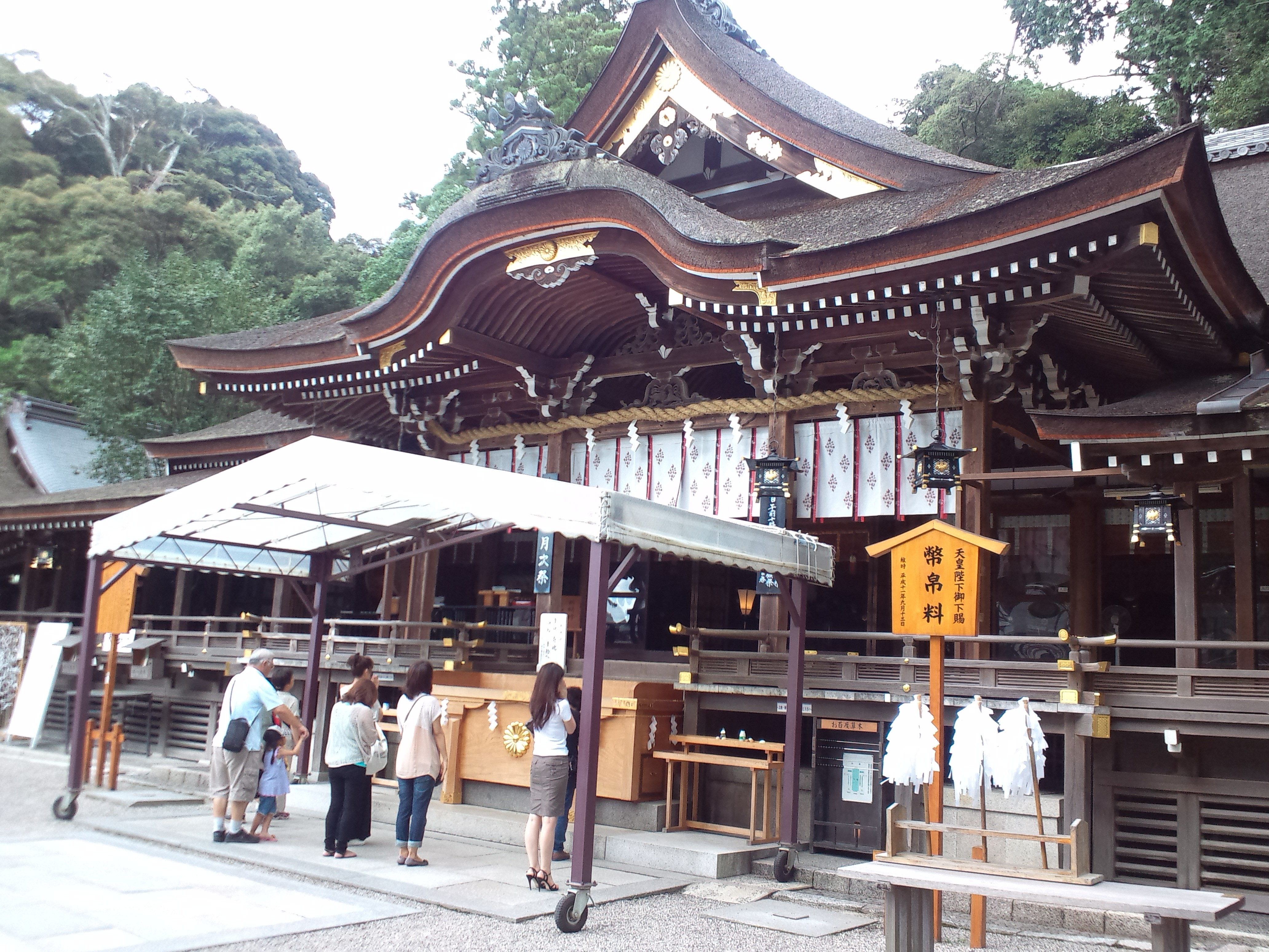 大神神社 拝殿